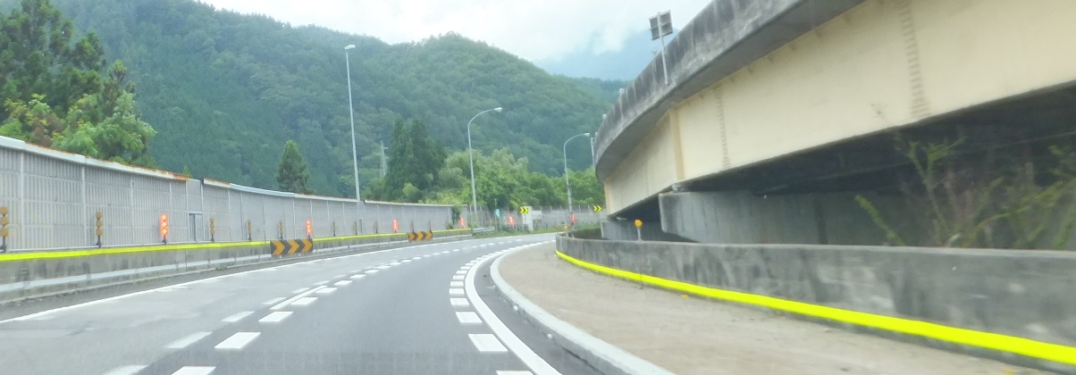 阿智カーブ